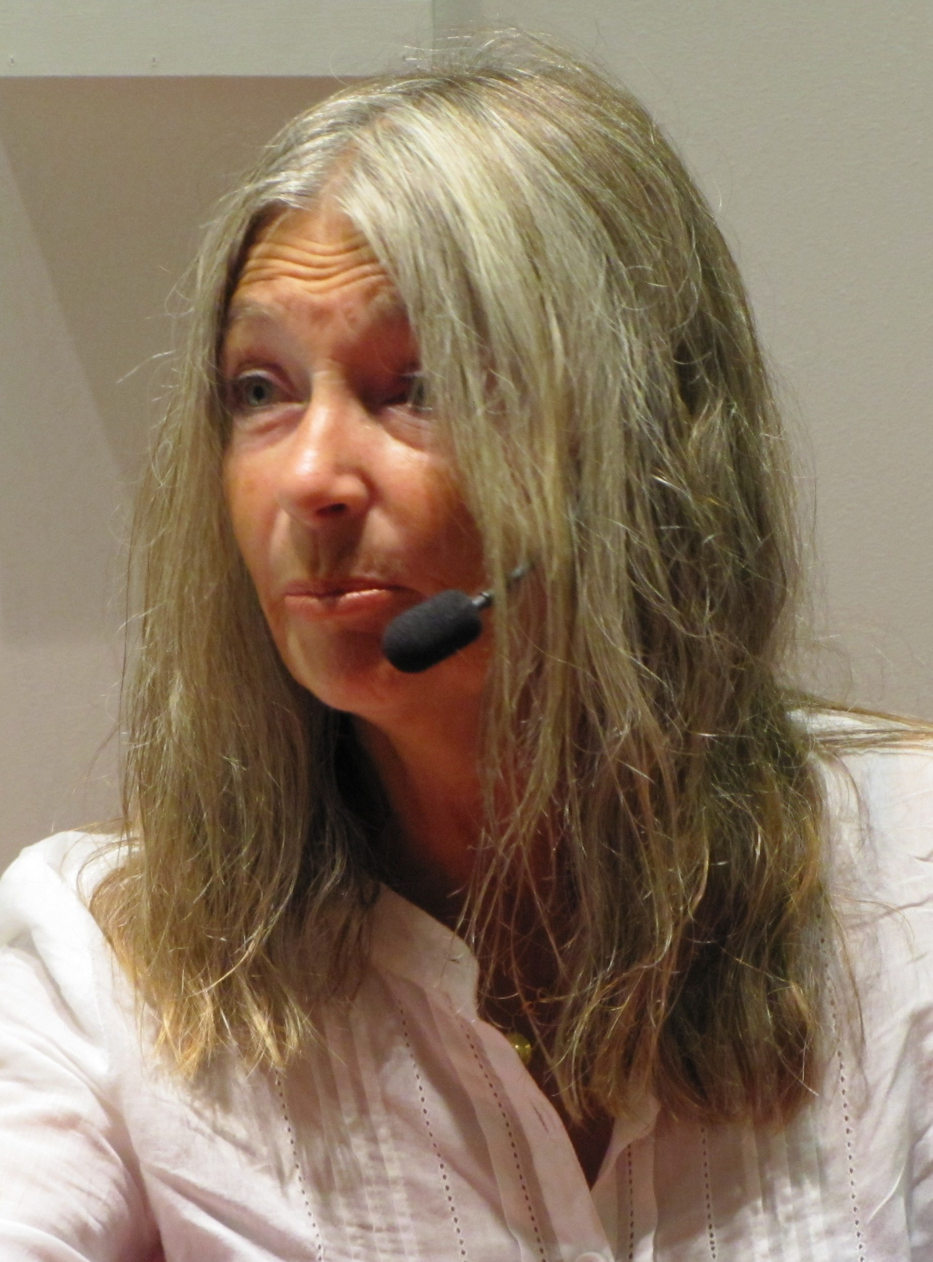 Cannie Möller, svensk ungdomsboksförfattarinna.